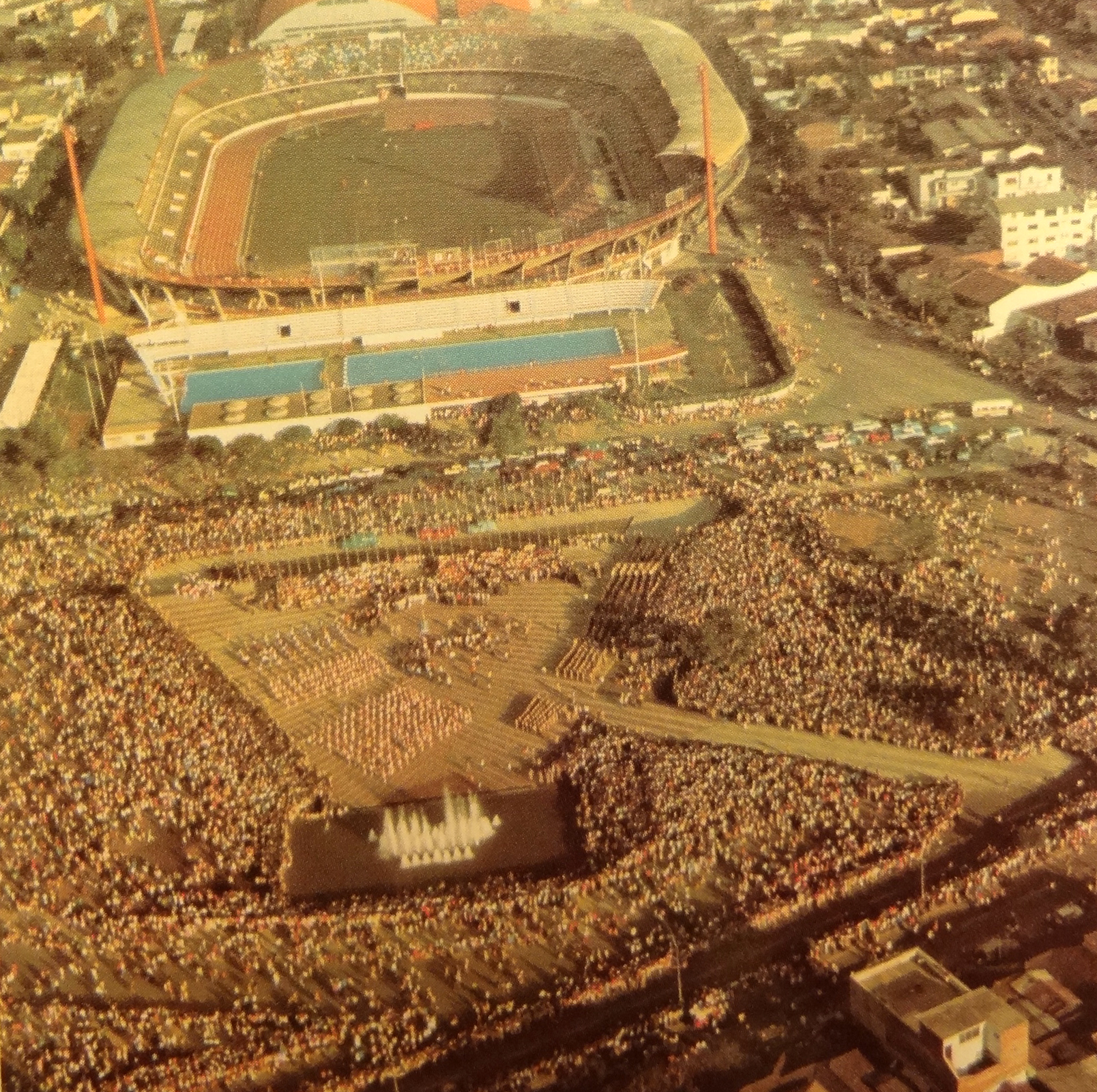 Foto de Cali Panamericana: VI Juegos Panamericanos 1971